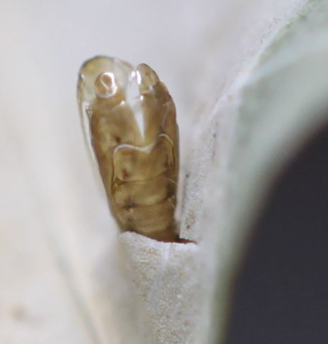 Geöffnete Puppe von Phyllonorycter quercifoliella an der Unterseite eines Stieleichenblattes ragt aus Mine heraus, Mitte September 2019